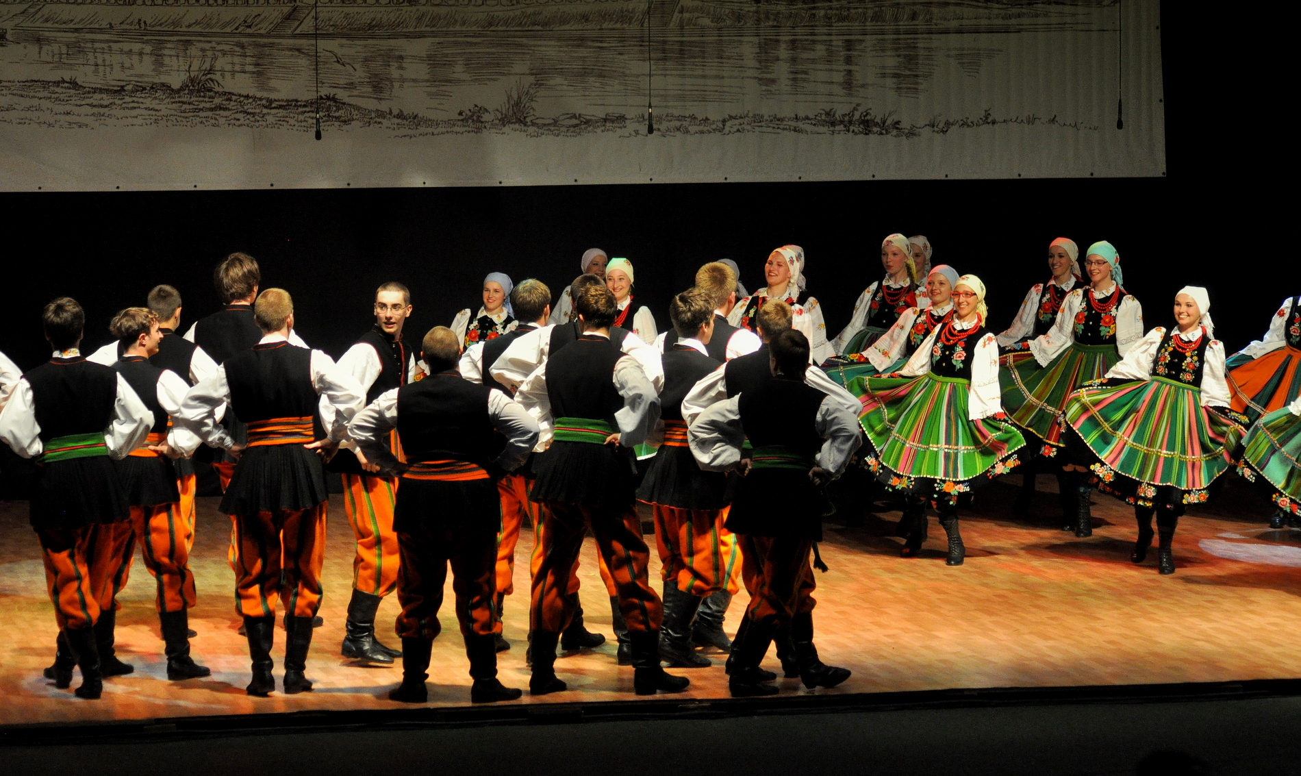 Zespół Tańca Ludowego "Mali Gorzowiacy" tańczy łowickiego oberka